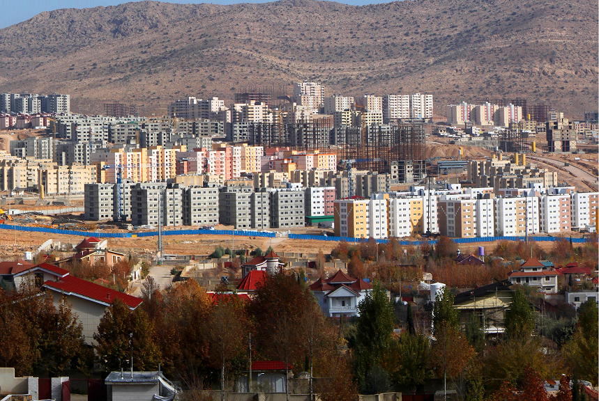 cut from File:Sadraa.jpg